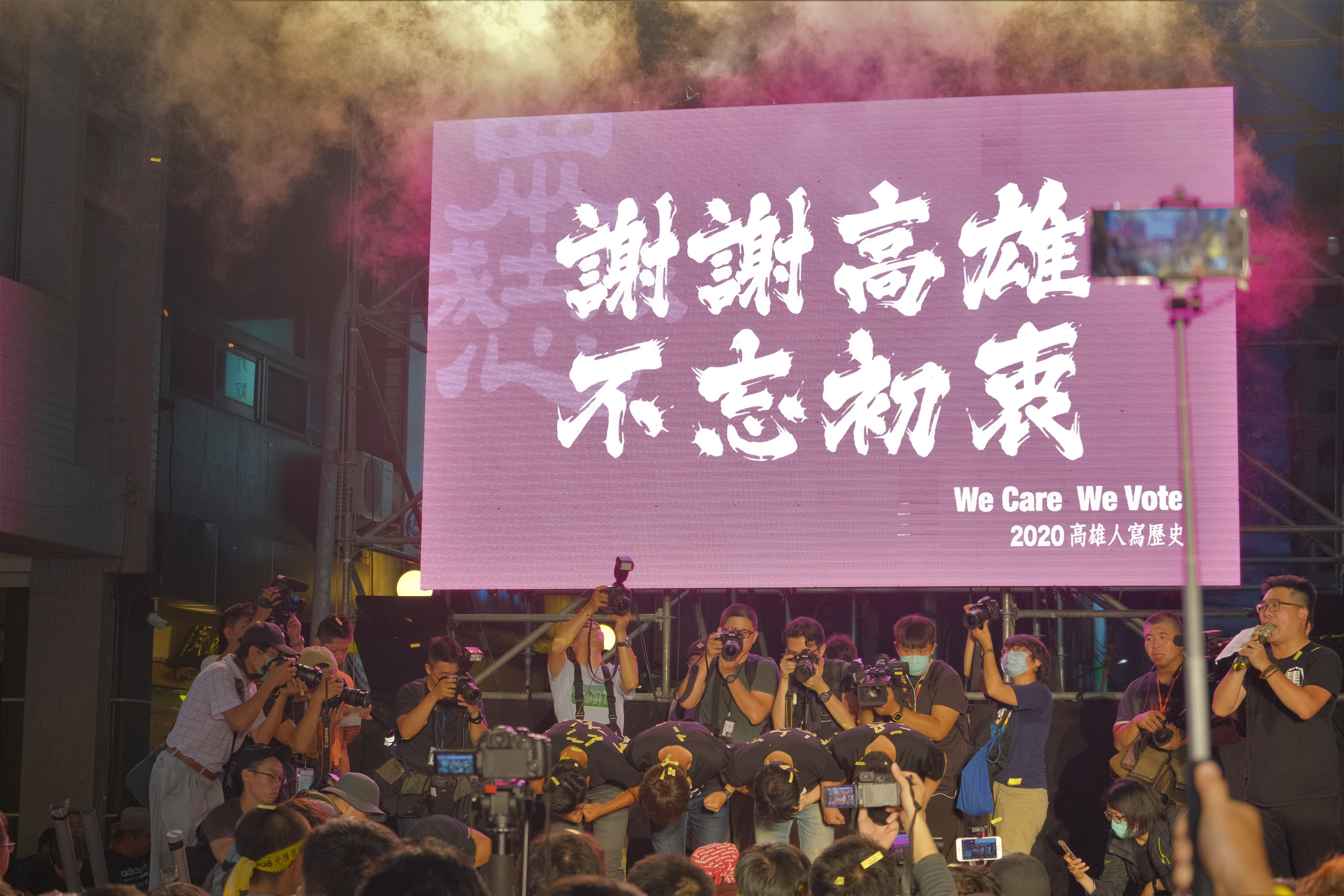 中文（台灣）: zh:2020年高雄市市長韓國瑜罷免案 開票之夜謝票活動。